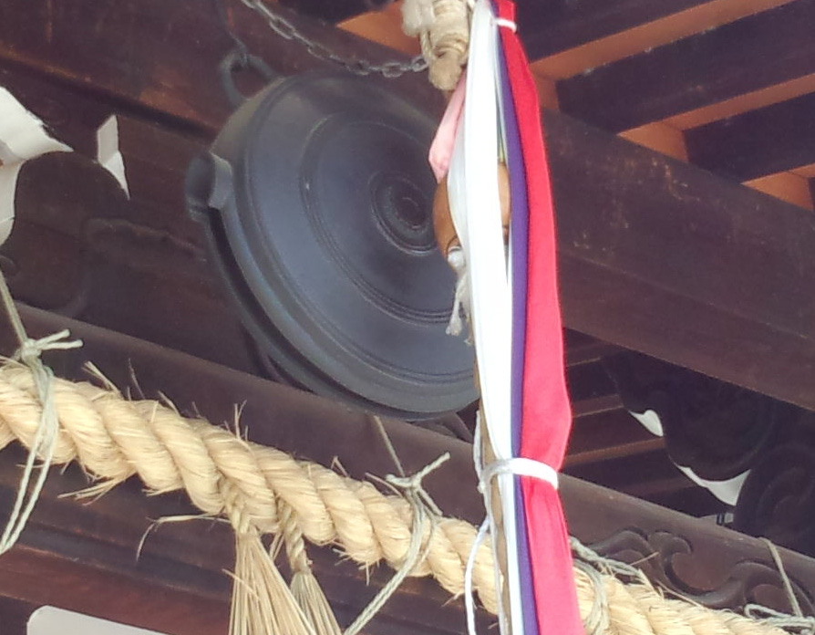 鰐口（吉祥院天満宮吉祥天女社）